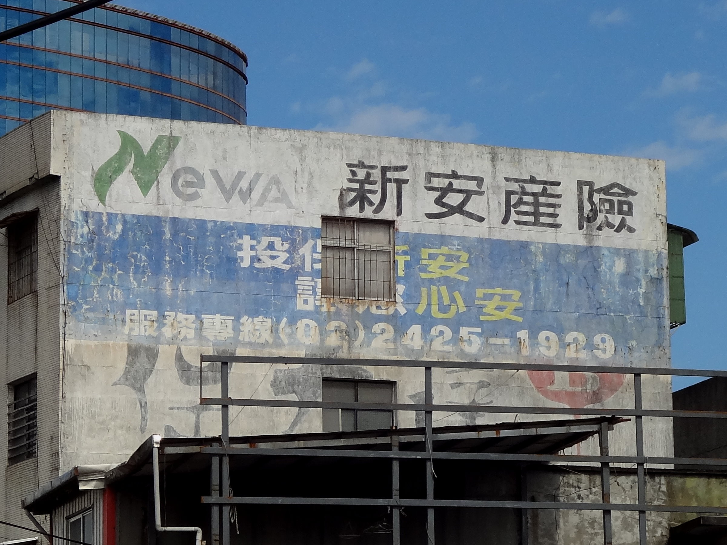 中文（台灣）: 基隆市七堵區明德二路與光明路口，裕隆集團新安產物保險（今新安東京海上產物保險）廣告牆，下端覆蓋保力達B廣告牆上端。